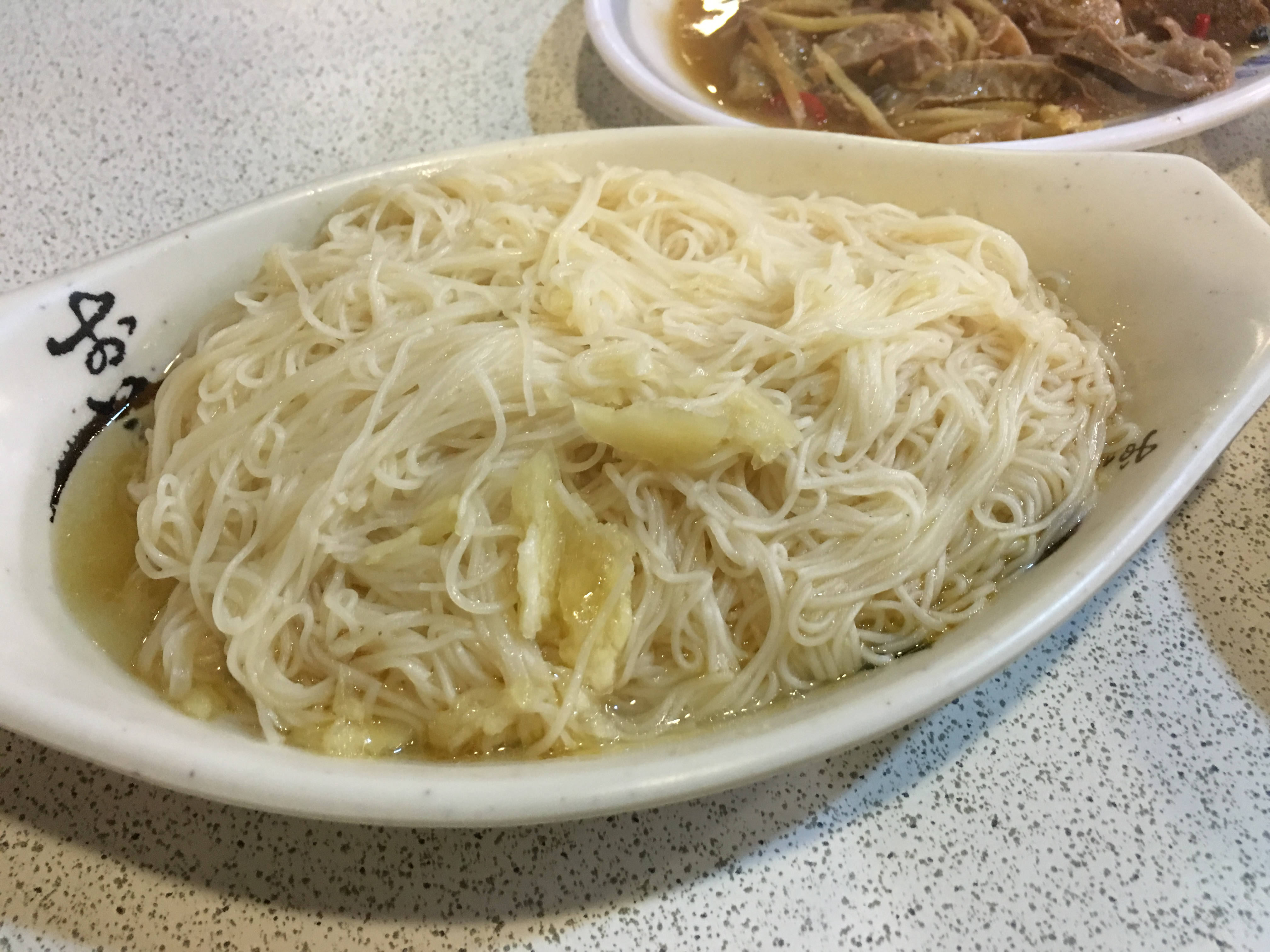 拌麻油麵線, 岡山羊肉爐, 遼寧街, 台北